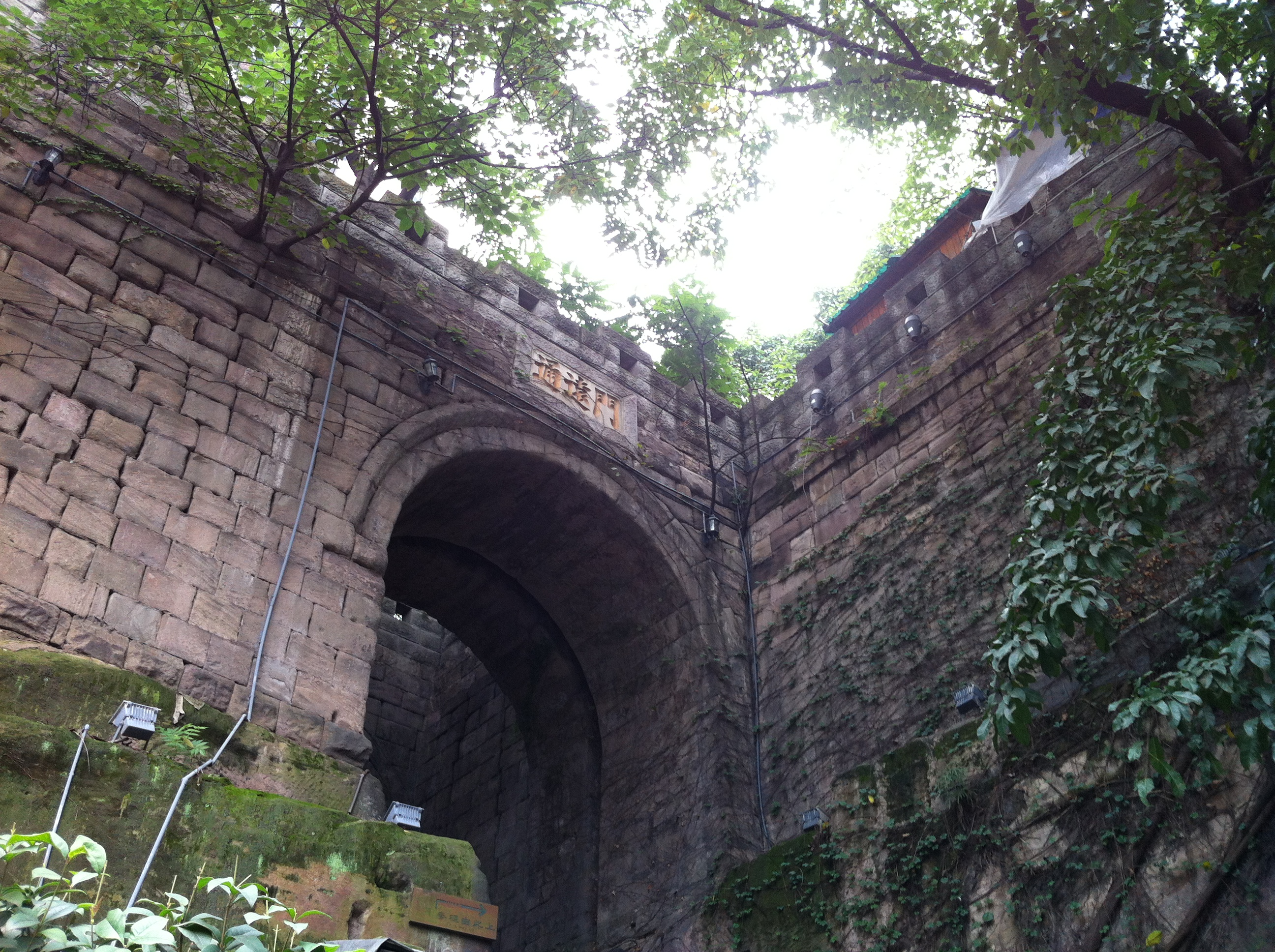 通远门门洞